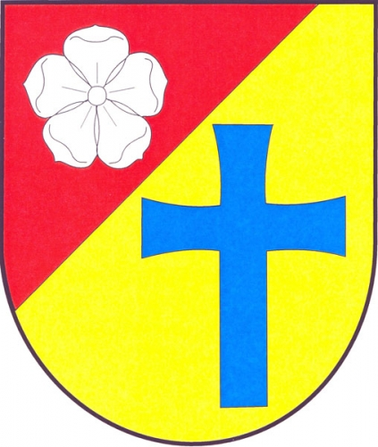 znak, Moravec, okres Žďár nad Sázavou